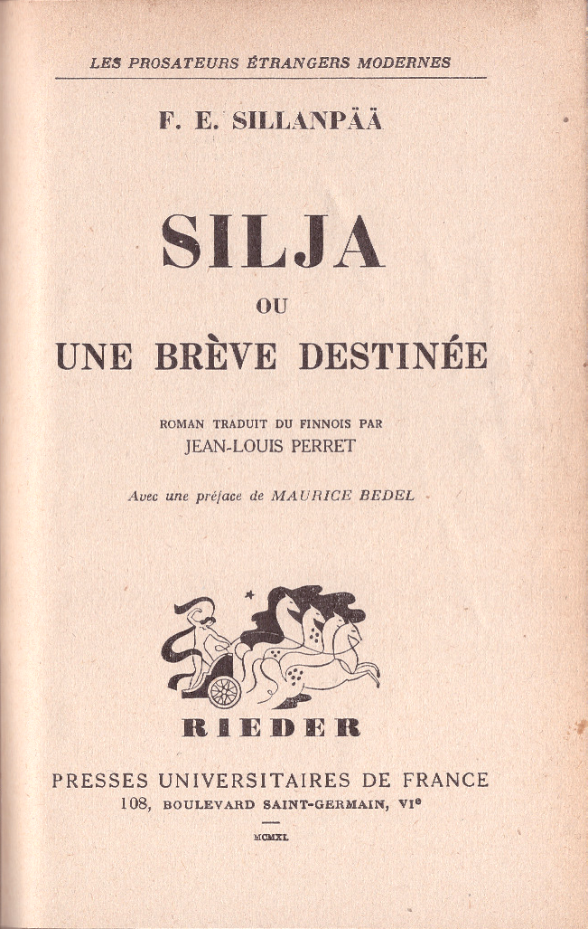 Page de garde l'édition de 1940 de la traduction française de "Silja ou une brève destinée", parue chez Rieder.